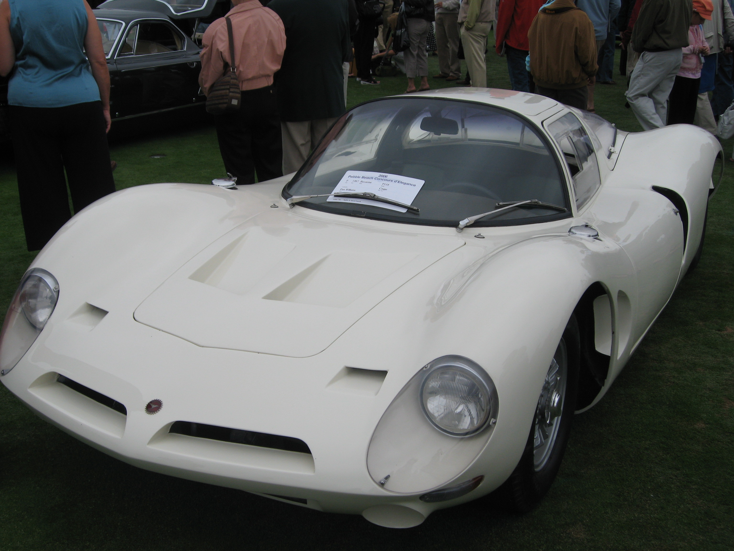 1967 Bizzarrini Duca D'Aosta.IMG_3984